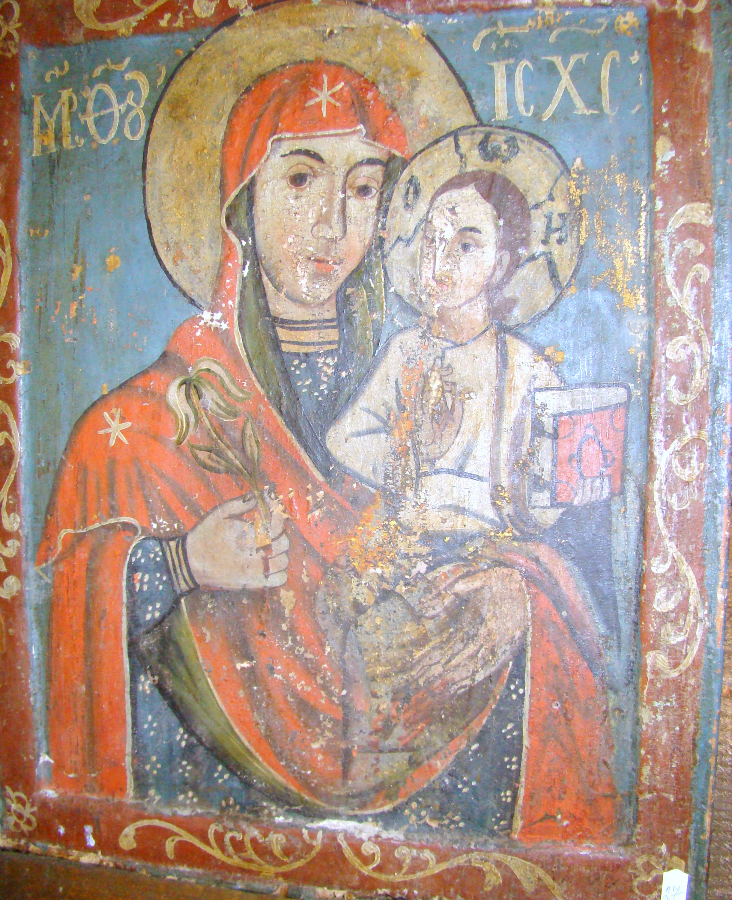 Biserica de lemn din Tinca, județul Bihor